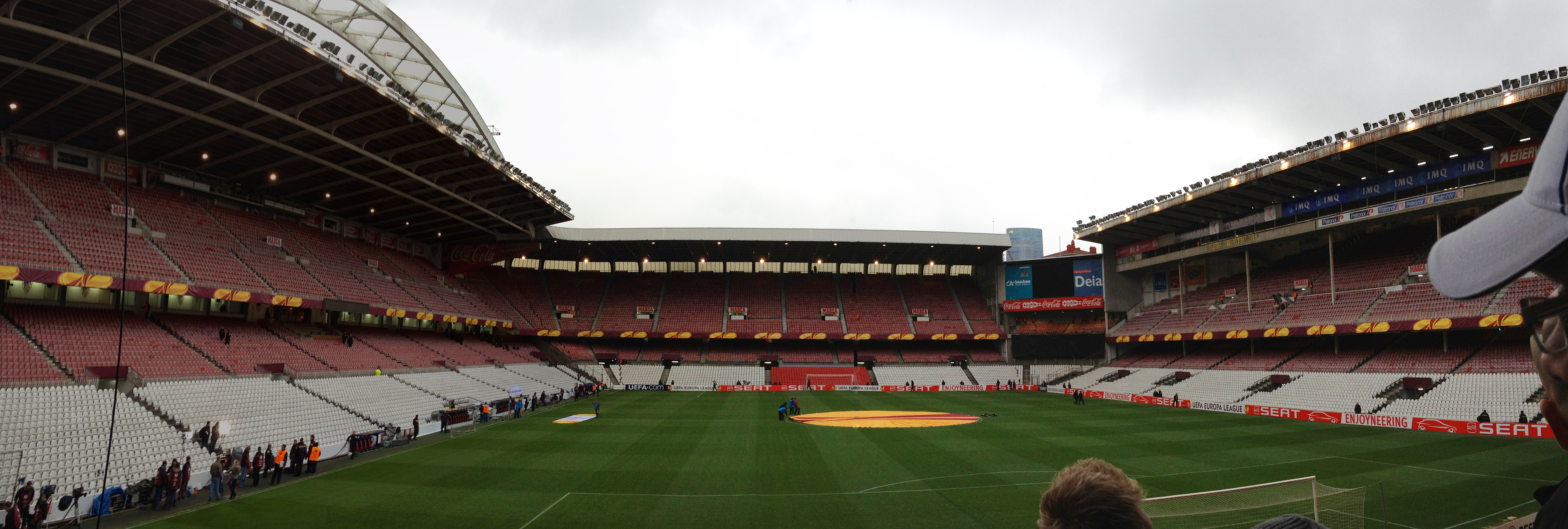 Innenraumpanorama des Estadio San Mames vor dem UEFA Europa League-Spiel von Athletic Bilbao gegen den FC Schalke 04, aufgenommen aus dem Gästeblock.